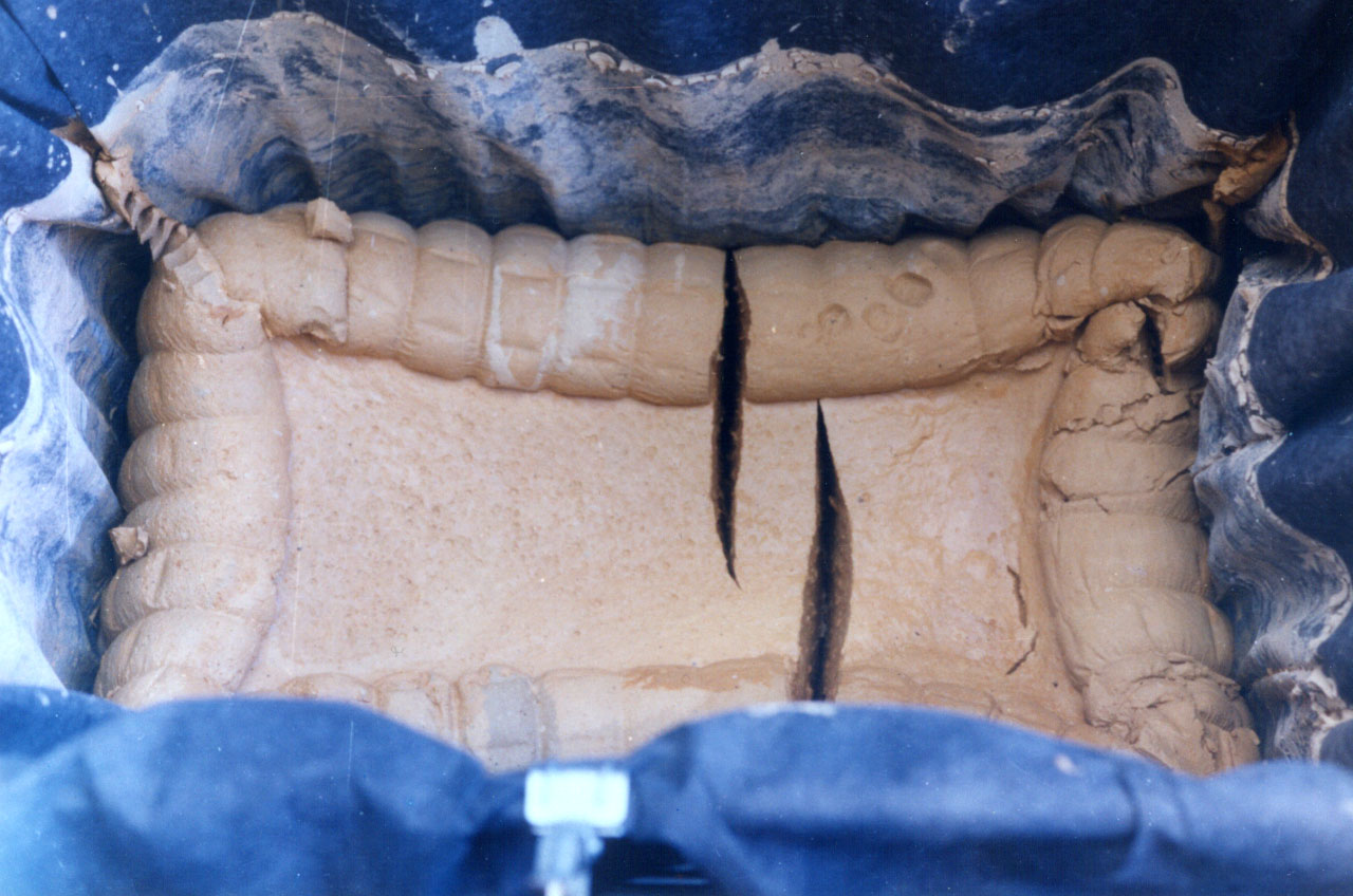 Un blocco di fango dopo il trattamento di disidratazione